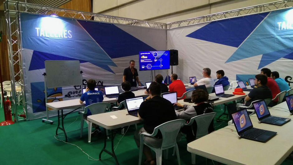 formacion Amazonn web services